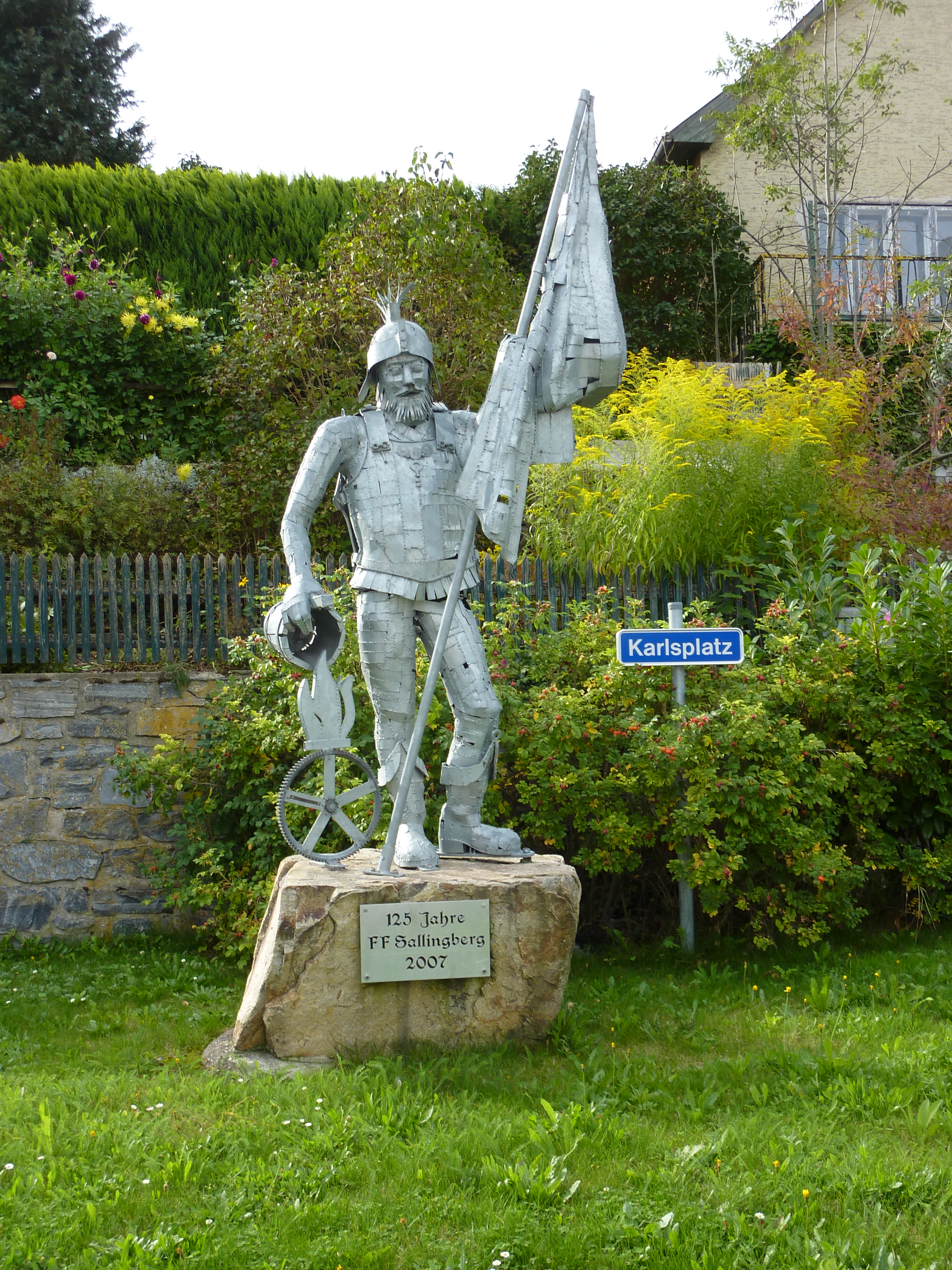 Statue hl. Florian in Sallingberg, Niederösterreich (Robert Colnago, bez. 2007)